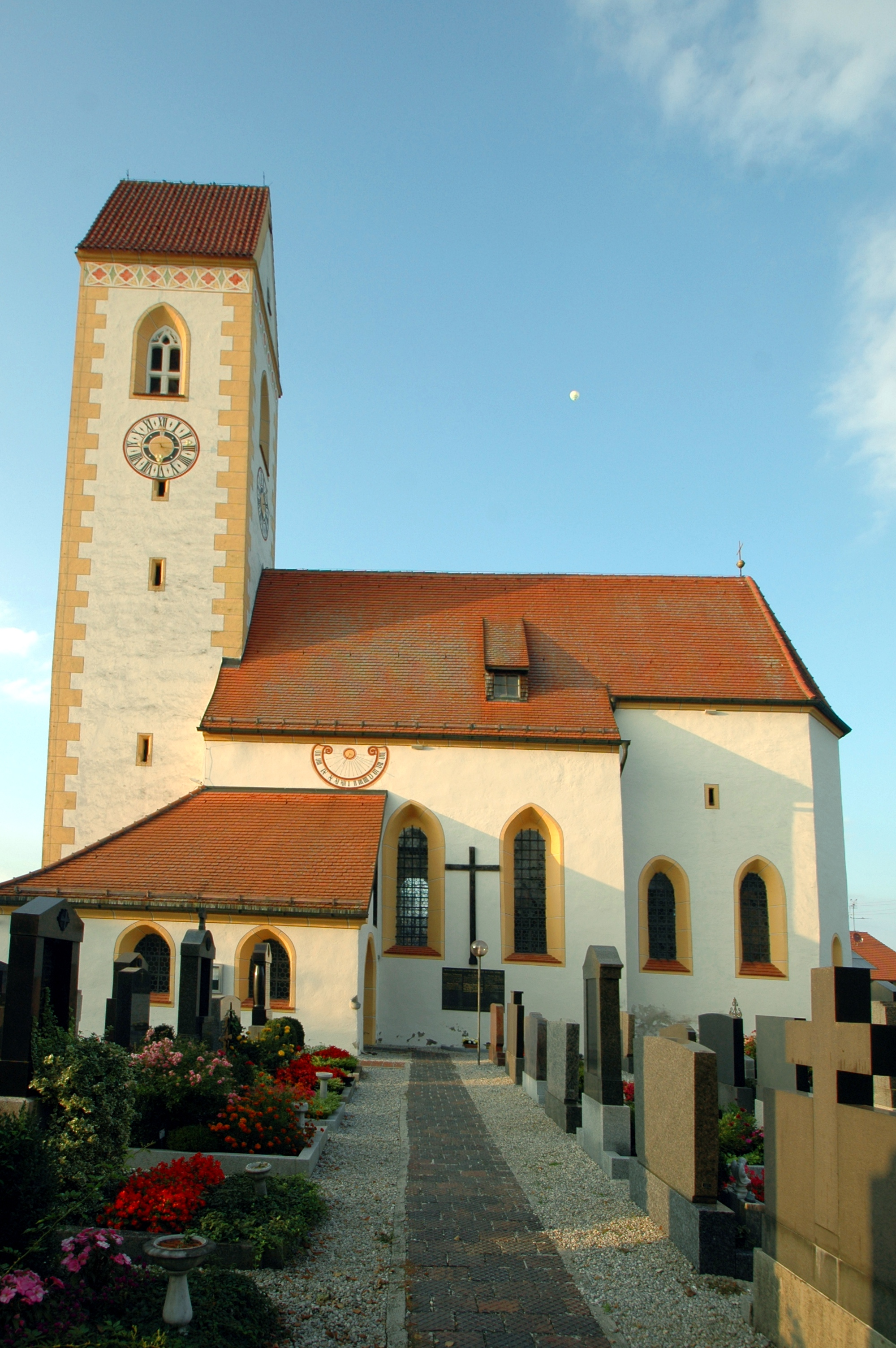 Kath. Pfarrkirche St. Martin, Högling (Bruckmühl), Chor und Langhaus um 1300, barocker Ausbau 1. Hälfte 18. Jh., Turm spätgotischThis is a photograph of an architectural monument.